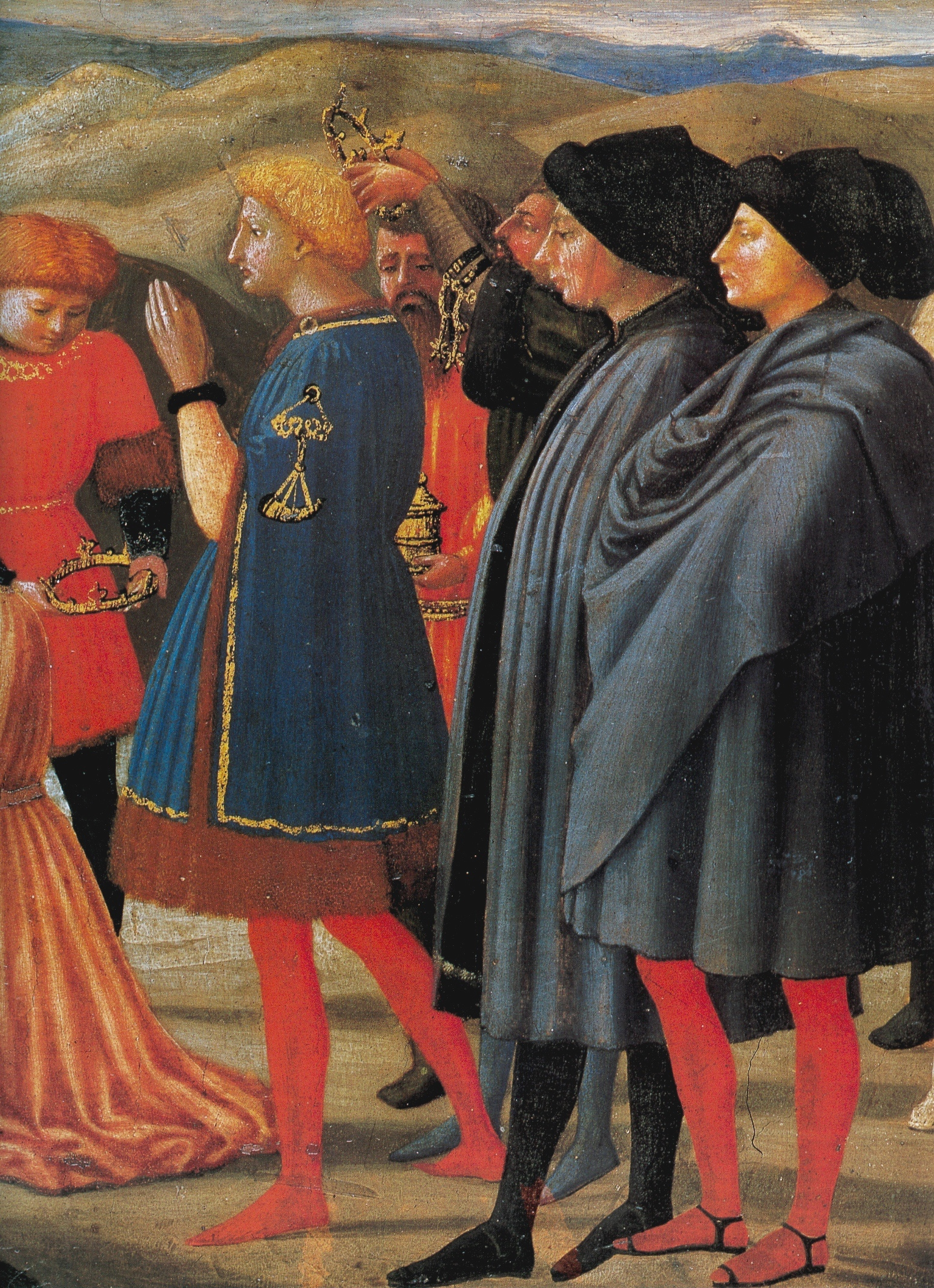 detail